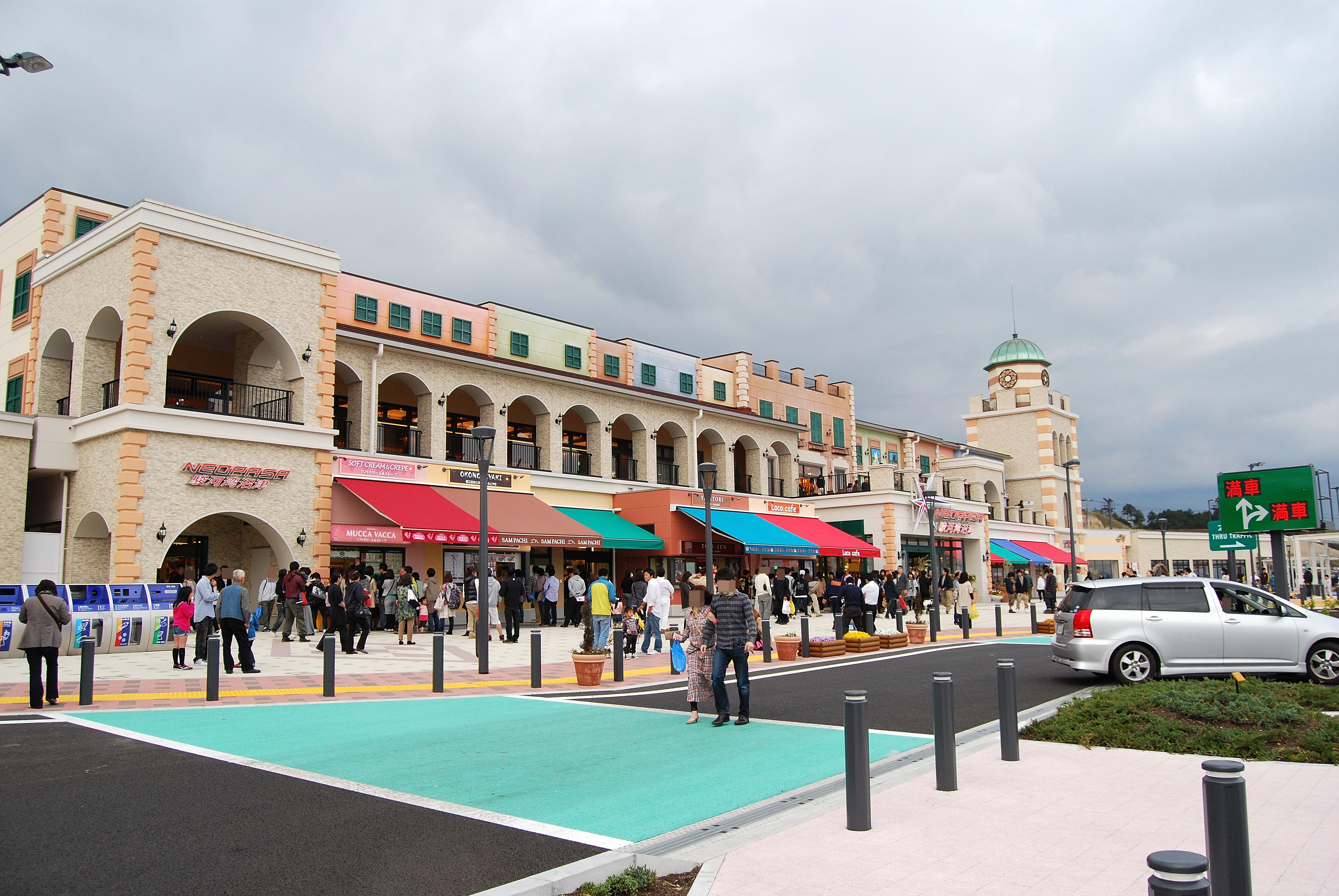 新東名高速道路上り線にある駿河湾沼津サービスエリアの建物。